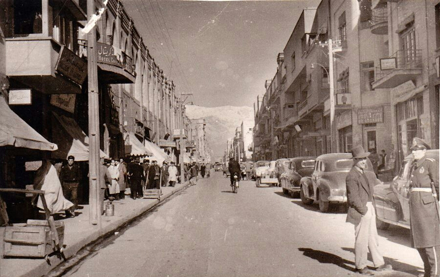 خیابان لاله‌زار، اواخر دهه ۱۳۲۰